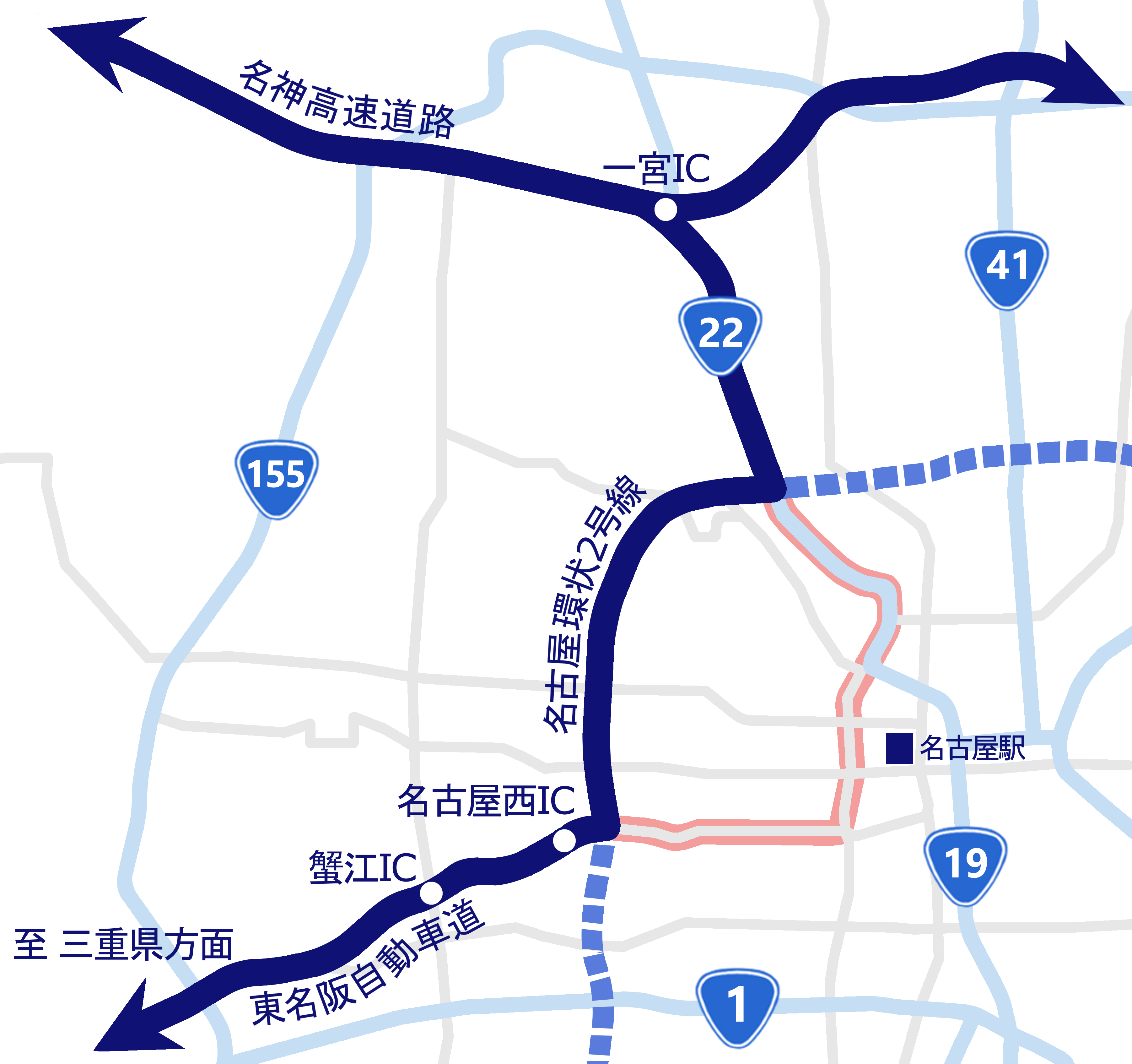 名古屋環状2号線説明図